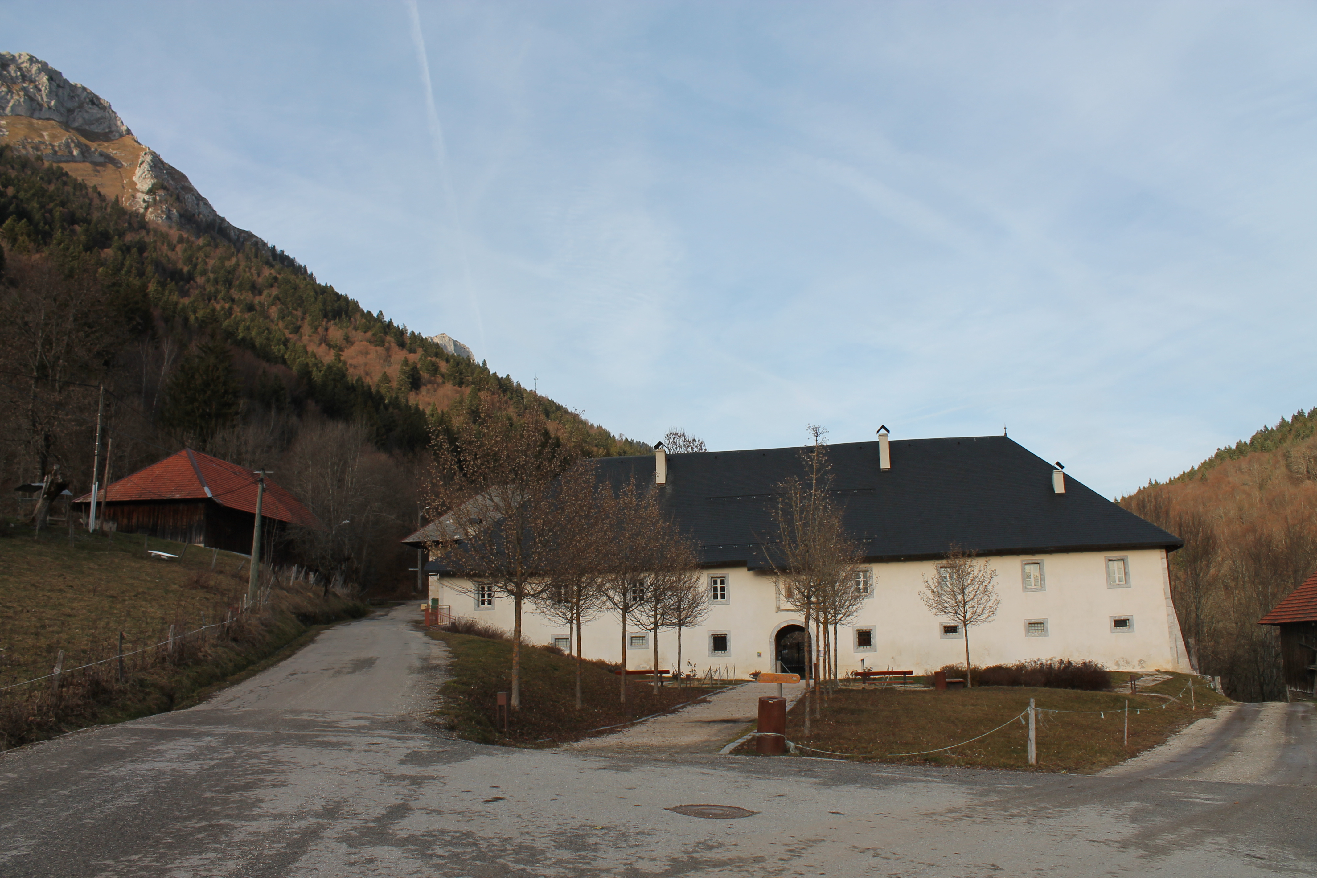 Vue du Colombier et bâtiment d'entrée de la Chartreuse d'Aillon